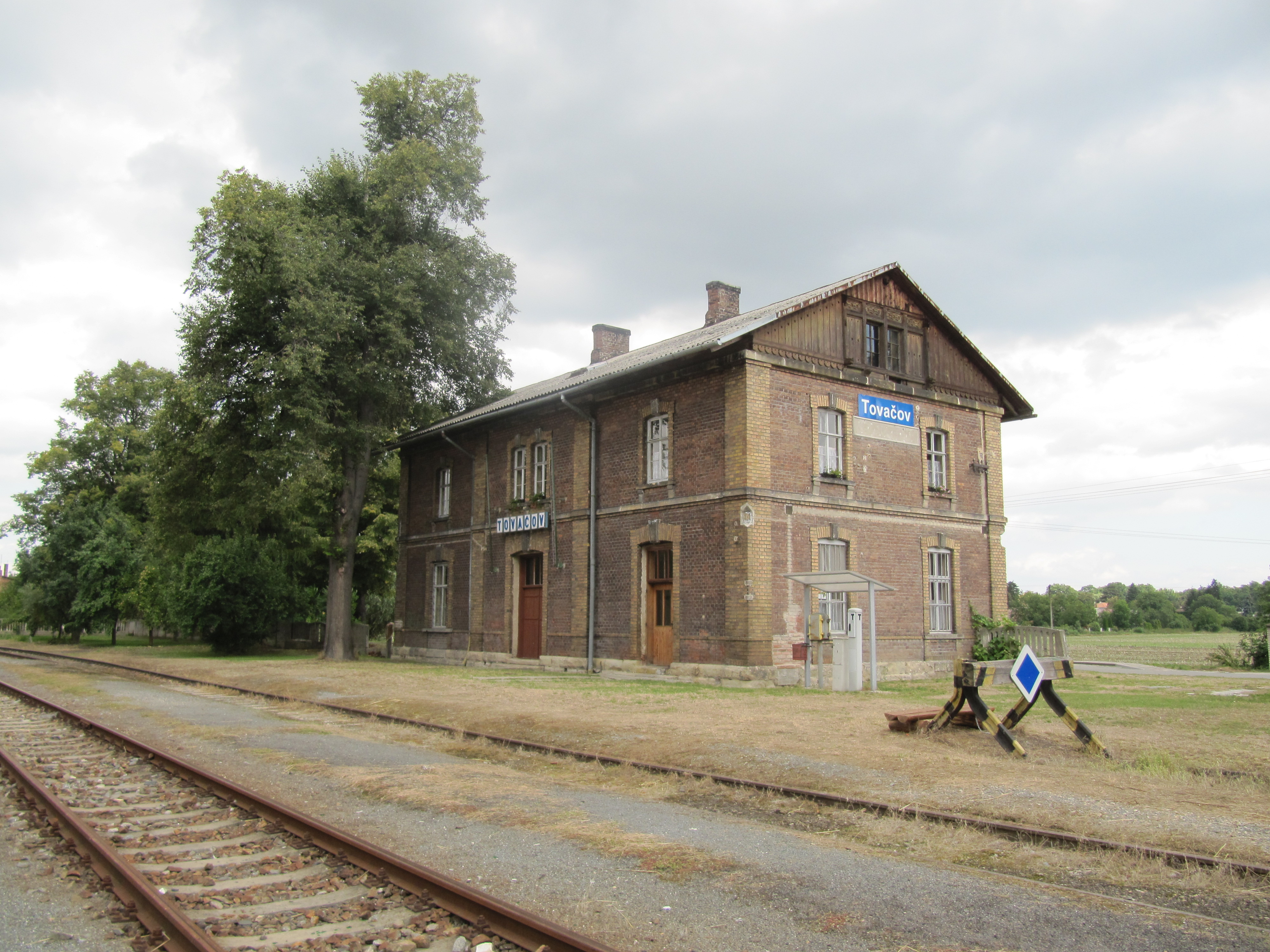 Tovačov, okres Přerov, Česká republika. Bývalé nádraží.